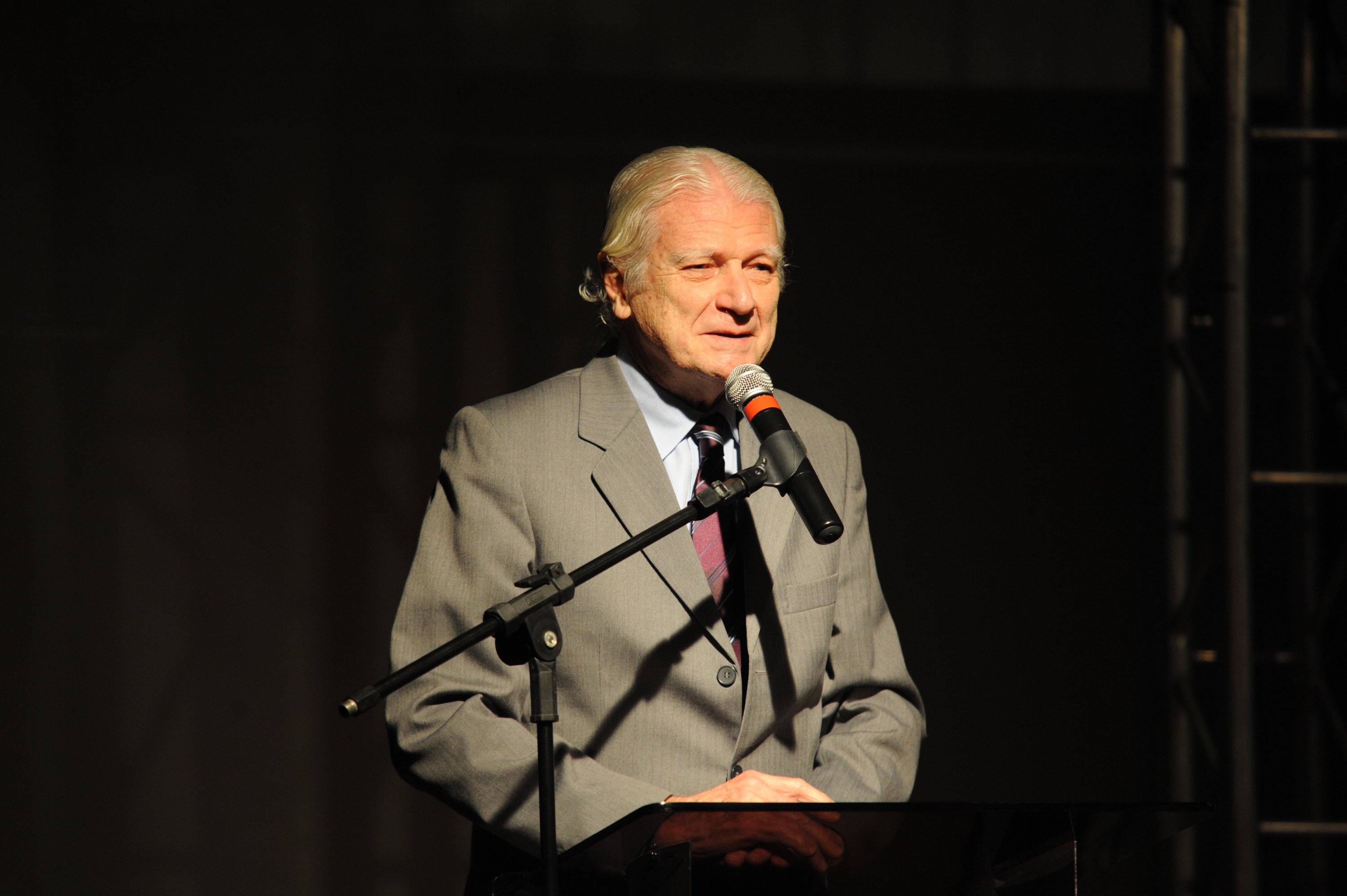 Geraldo Holanda Cavalcanti durante a cerimônia de lançamento do livro "Seu Conto É a Nossa História", na Academia Brasileira de Letras. Tomaz Silva / Agência Brasil, 13/12/2013